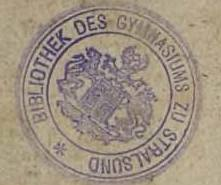 Siegel der Bibliothek des ehem. Gymnasiums Stralsund